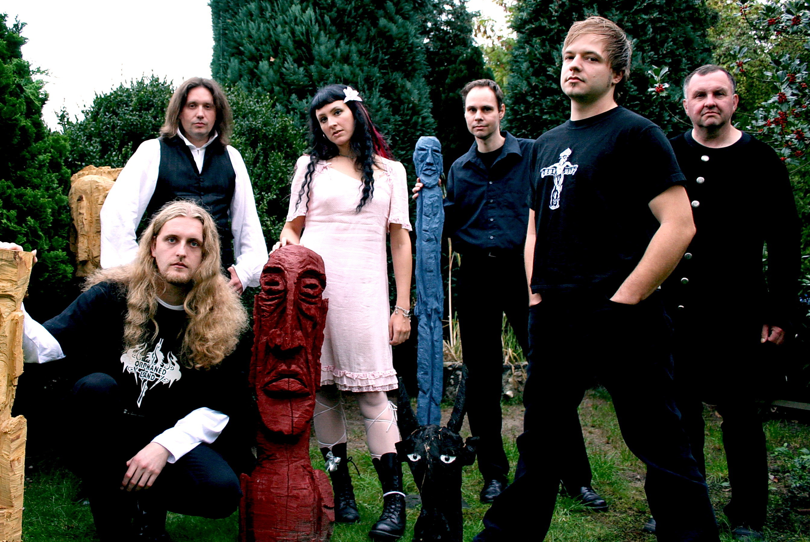 Violet Bandmitglieder